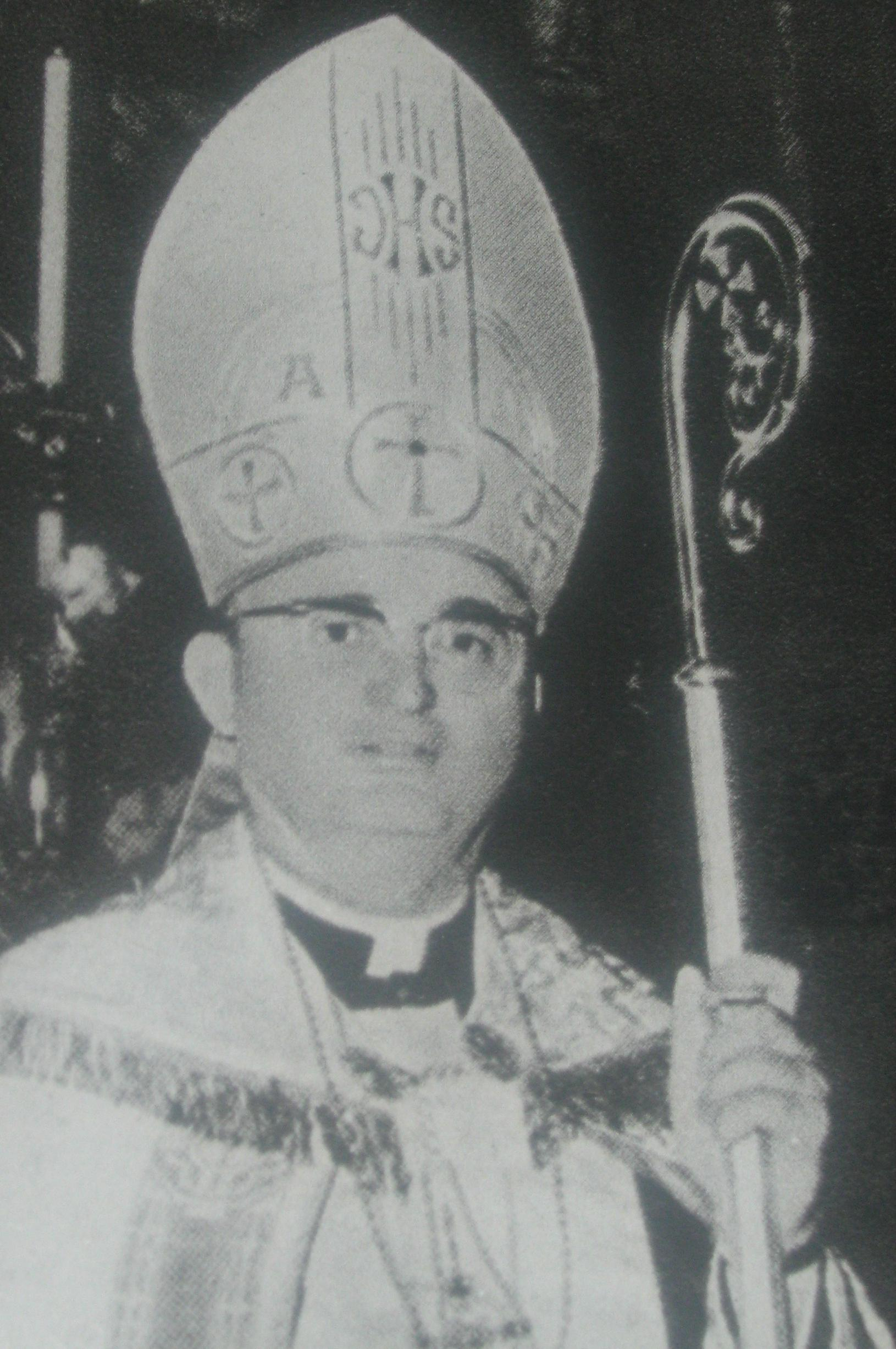 Biskup PNKK Franciszek Rowiński